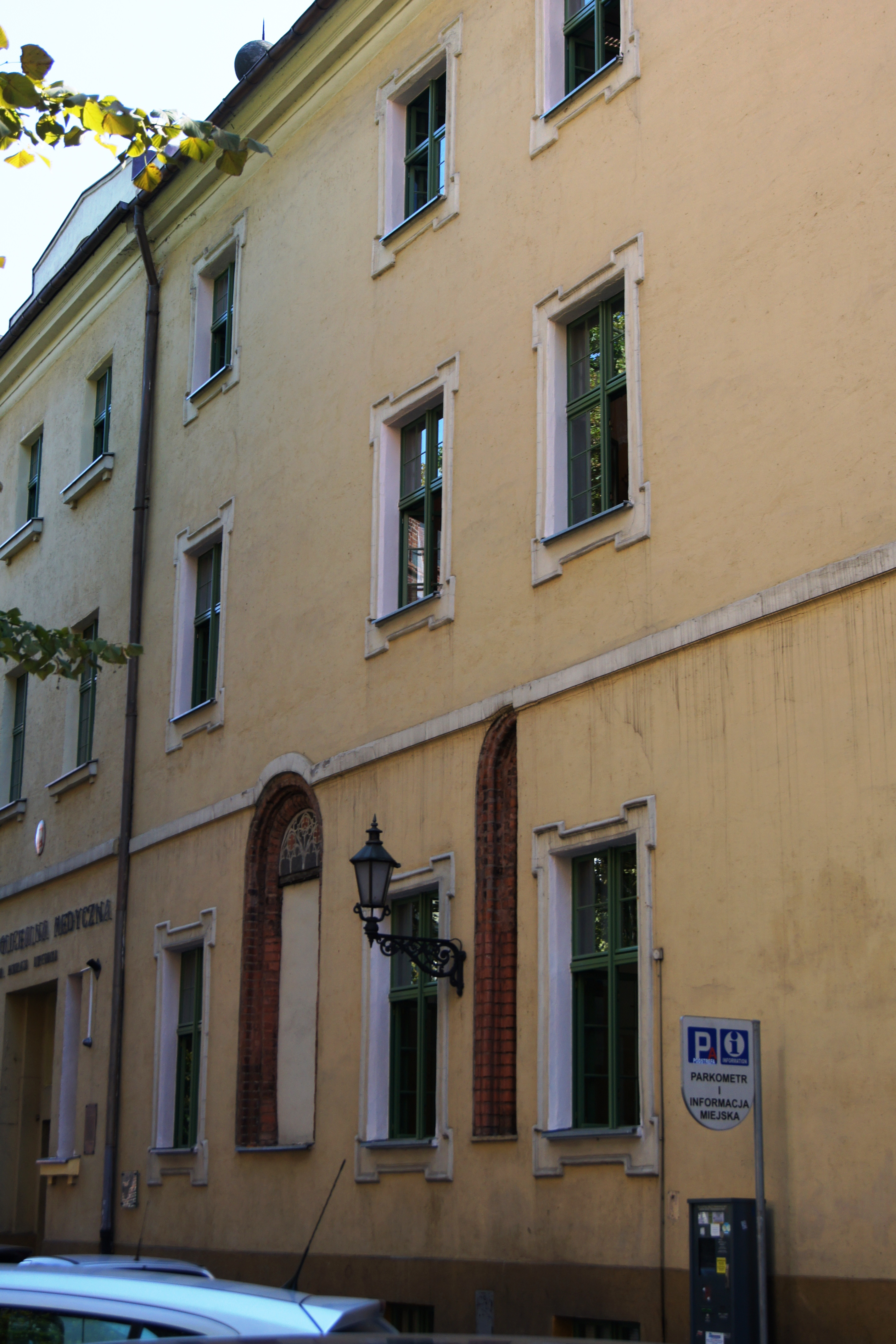 Toruń, ul. św. Jana 3 - dom, XVIII, XIX w. (zabytek nr A/273)